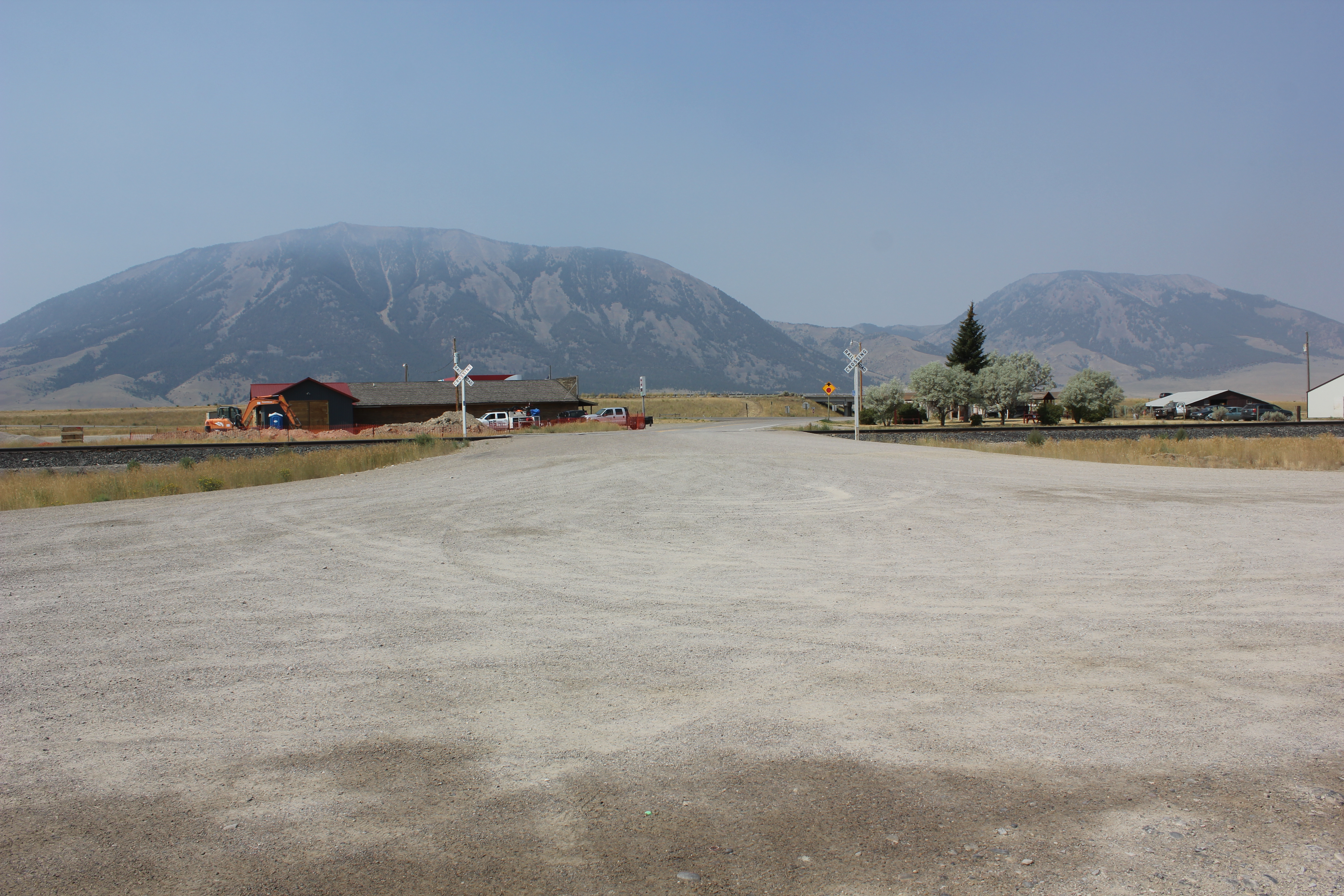 Dell, Montana.